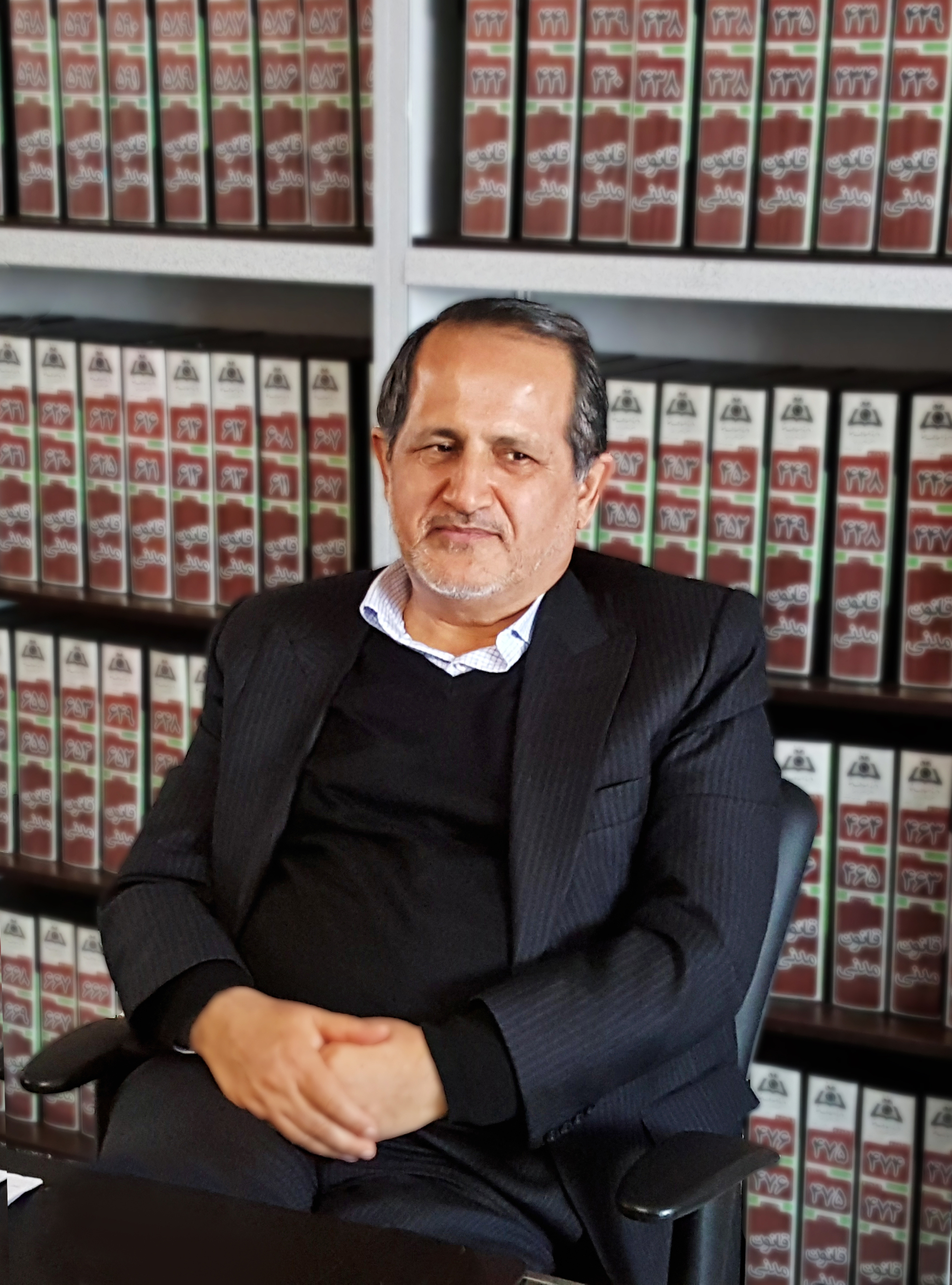 سید حسن میرحسینی در مرکز پژوهشی دانشنامه های حقوقی علامه